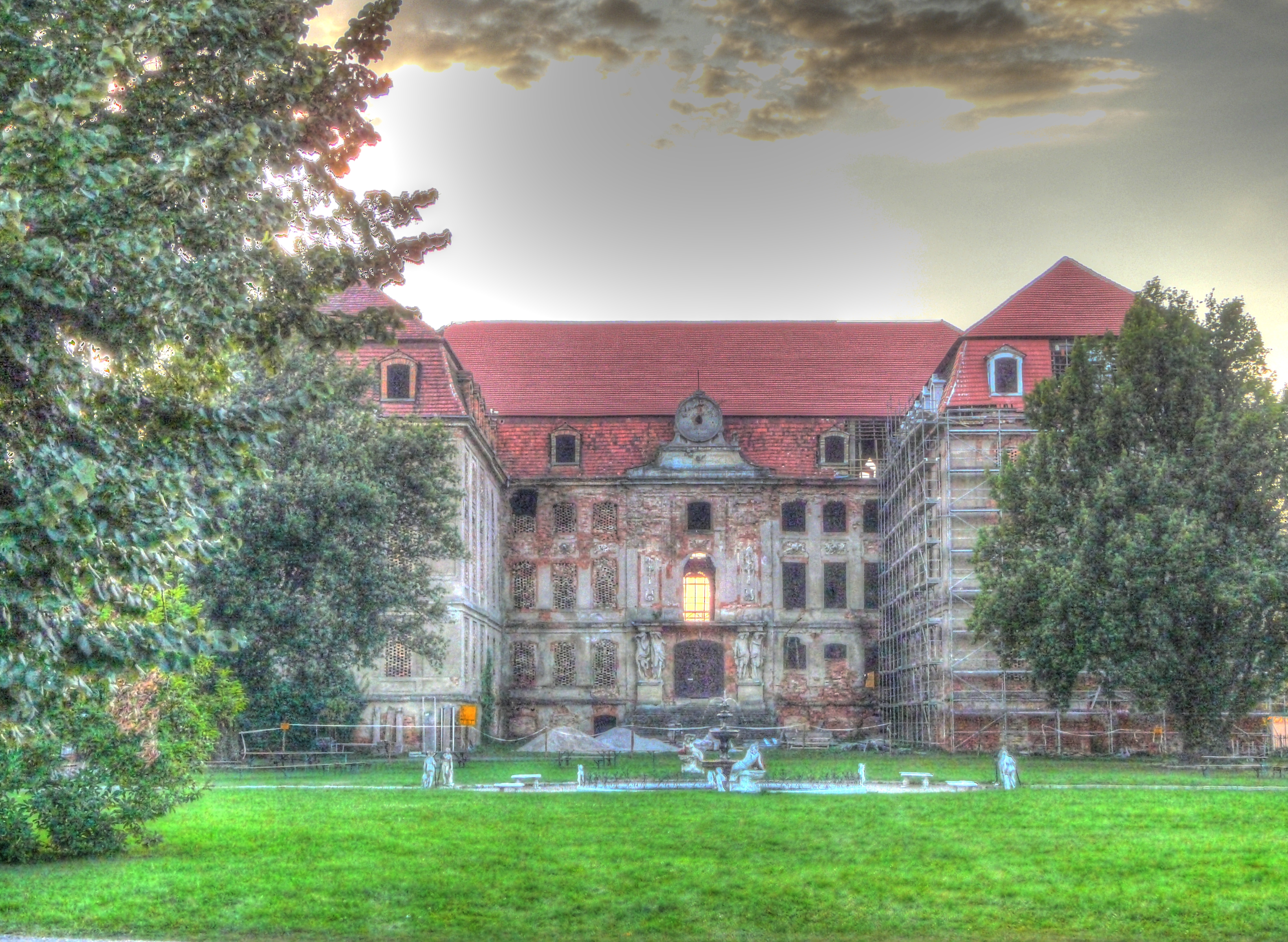 Brody - Pałac Brühla, XVIII, XX